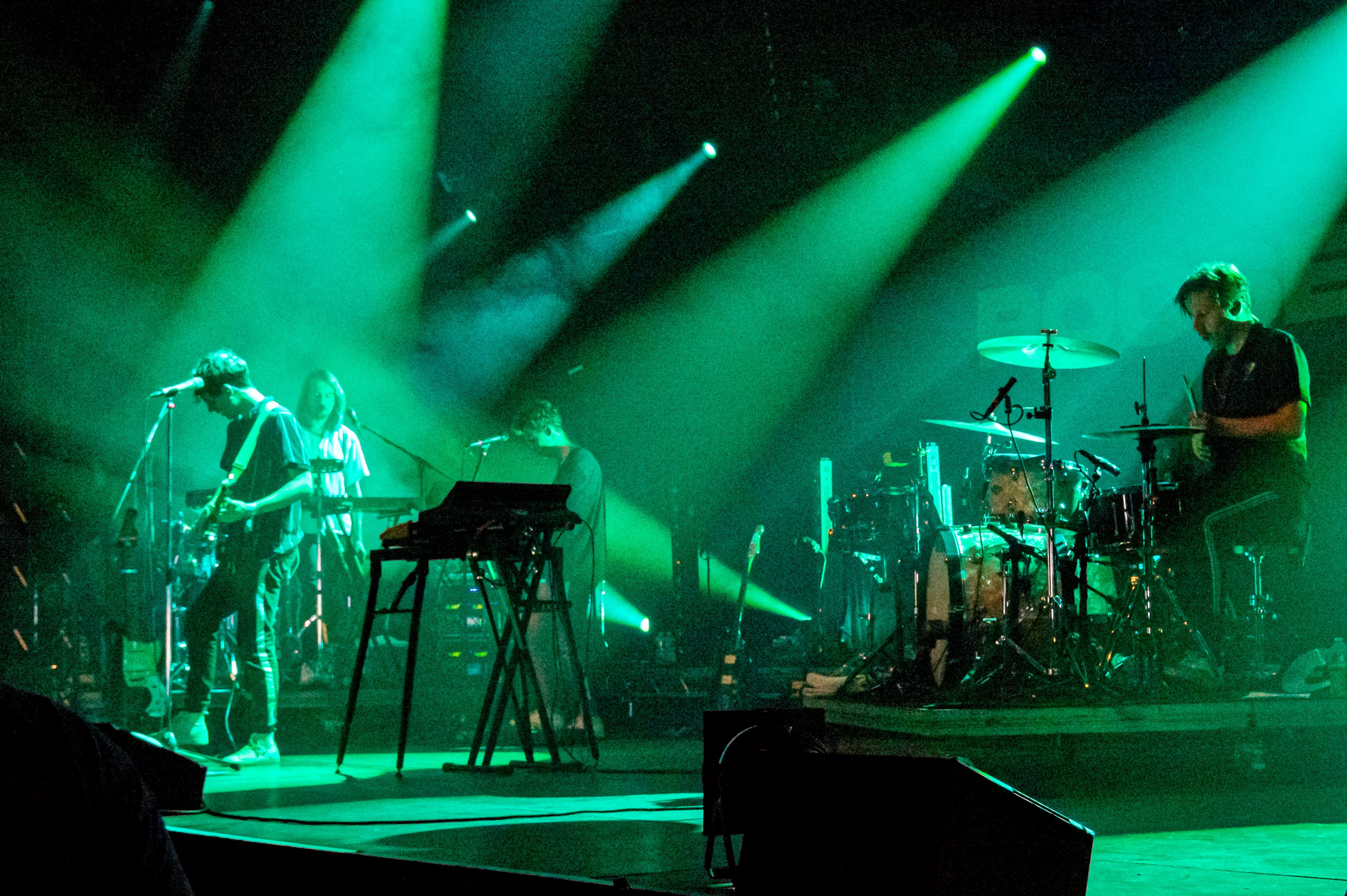 Bilder vom Zelt Musik Festival 2019 in Freiburg im Breisgau